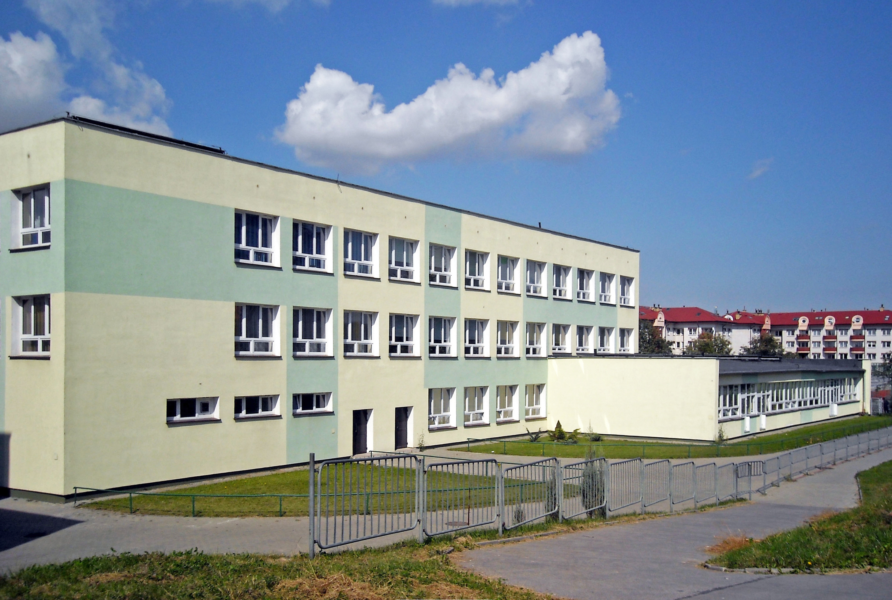 Szkoła Podstawowa nr 30 przy ul. Nałkowskich w lubelskiej dzielnicy Wrotków (widok od toru dla rolkarzy)